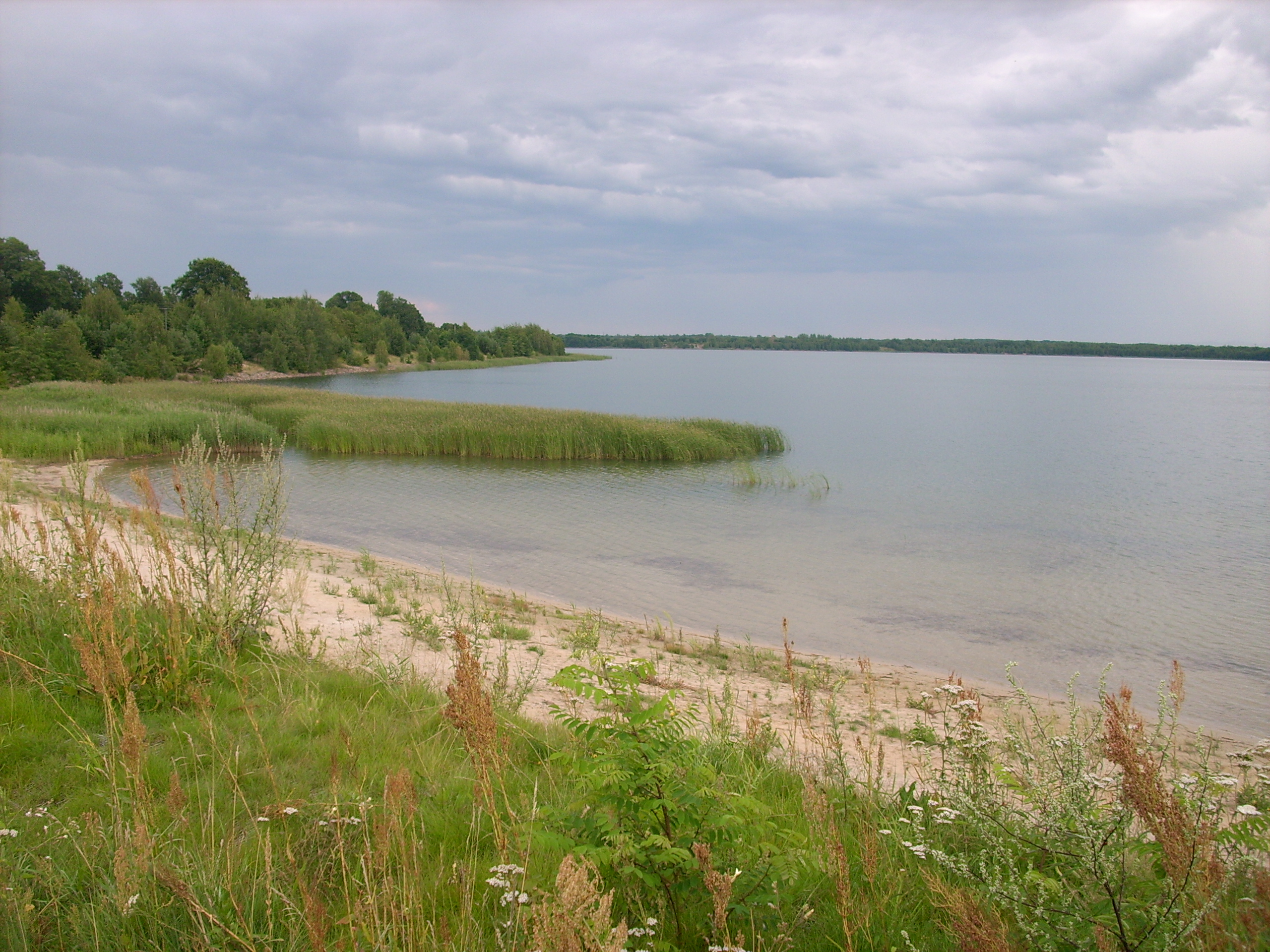 Dreiweiberner See bei Lohsa Hornjoserbsce: Při Třižonjanskim jězorje pola Łaza